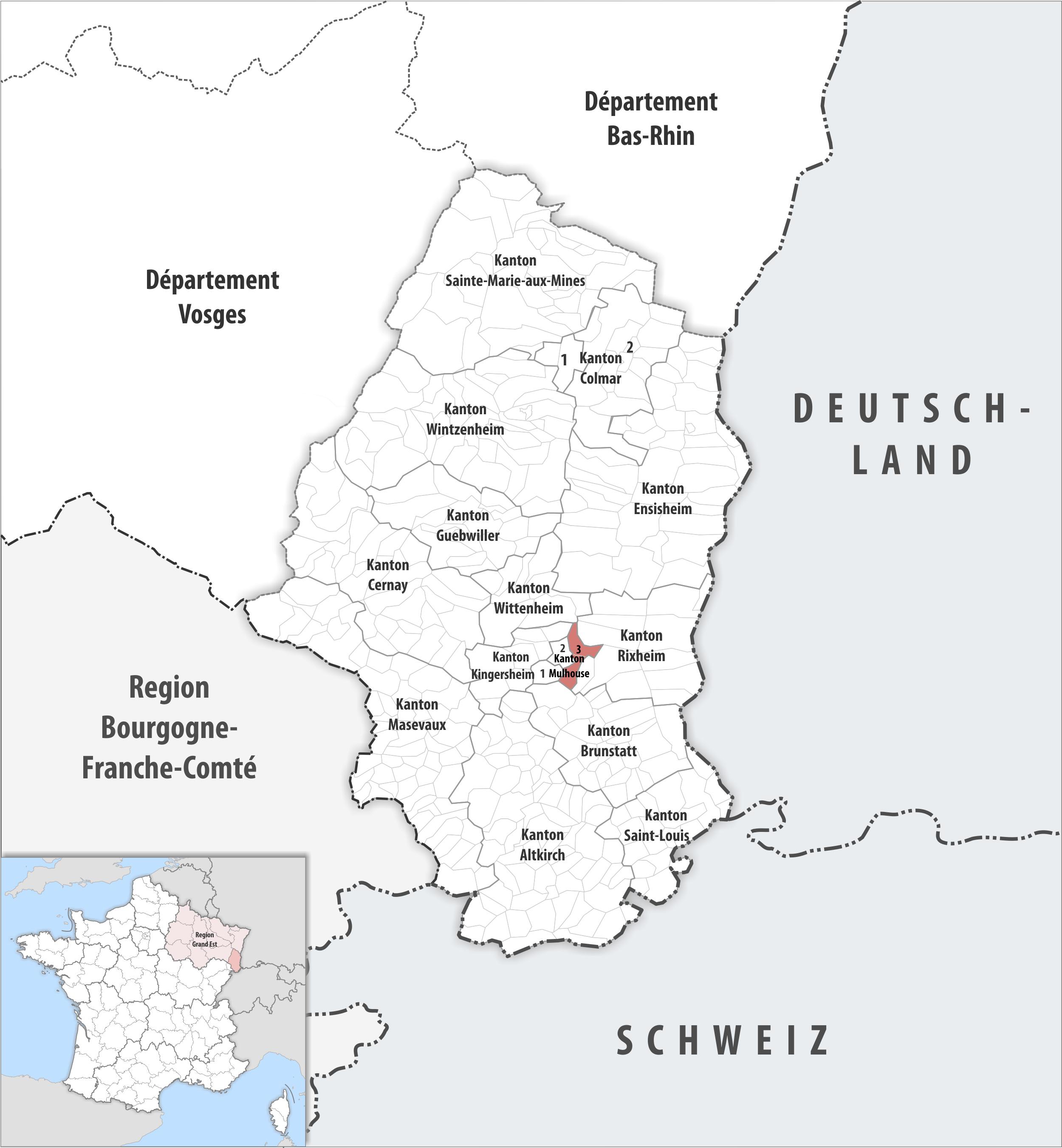 Lage des Kantons Mulhouse-3